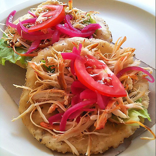 Salbutes de pavo